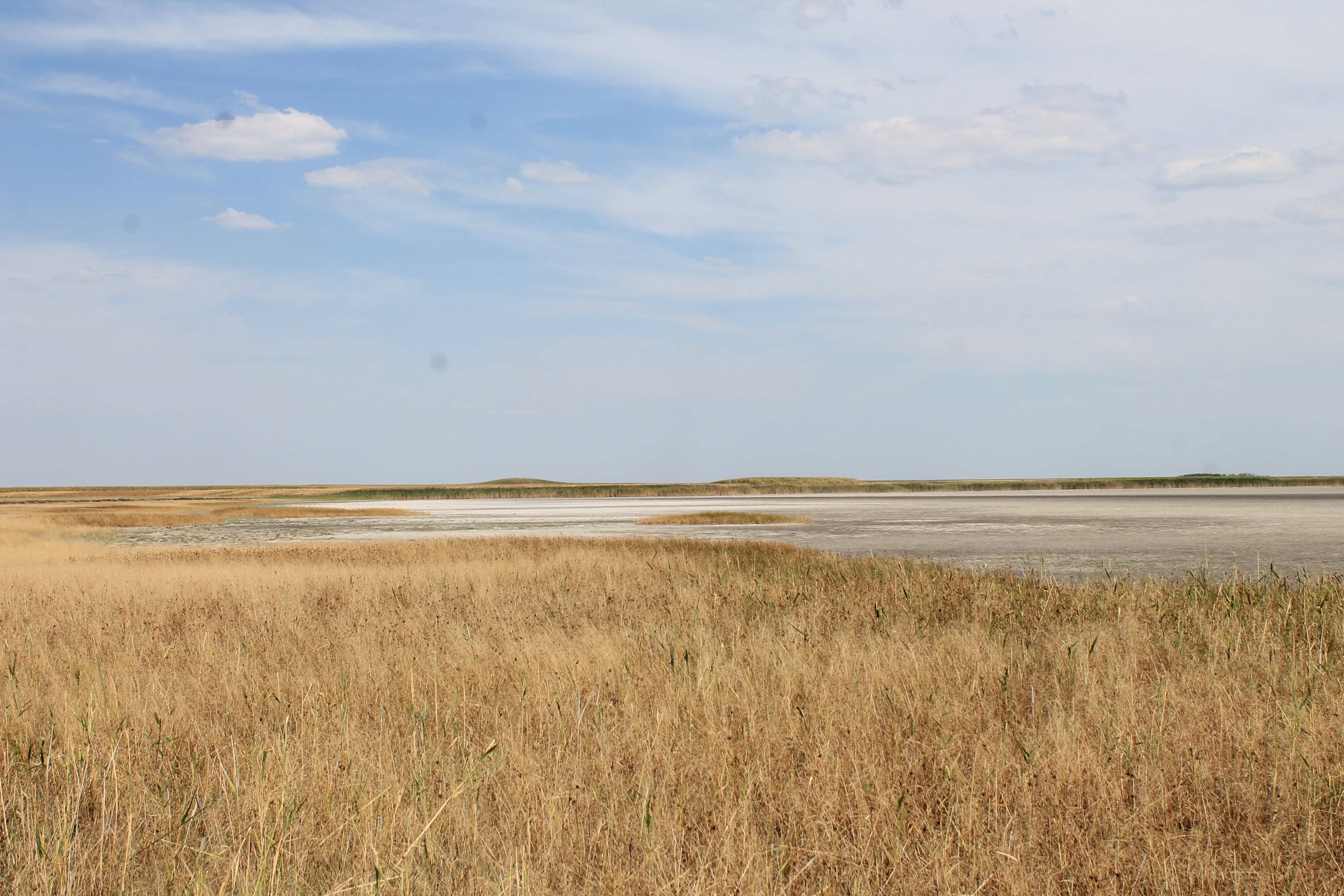 Slatinsko stanište Slano kopovo